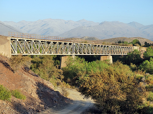 LA METÁLICA SOLEDAD DEL PUENTE FERROVIARIO DEL RÍO COMBARBALÁ, por CRISS SALAZAR